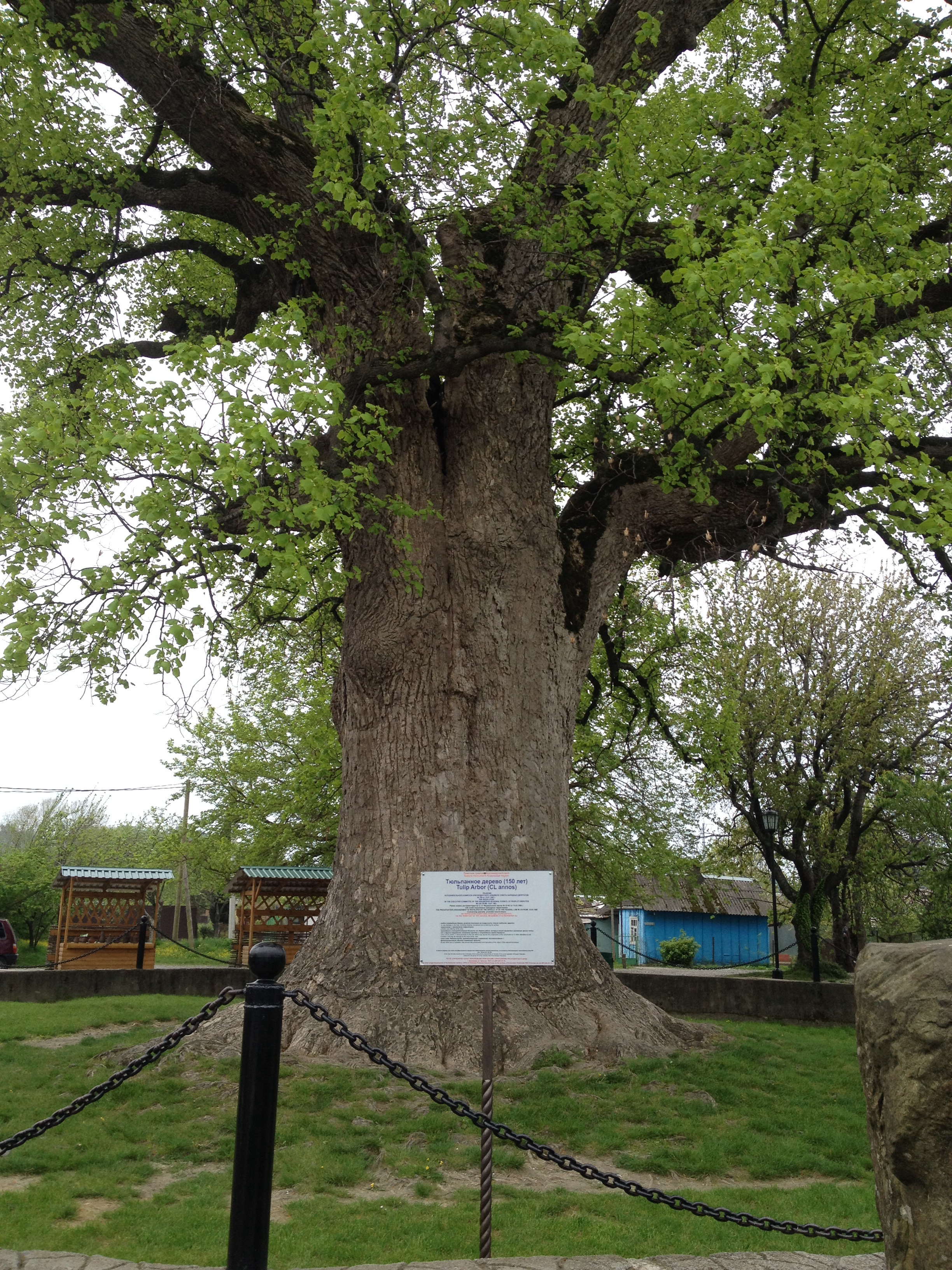 Тюльпанное дерево, Сочи This image is related to the protected area of Russia number 2310345